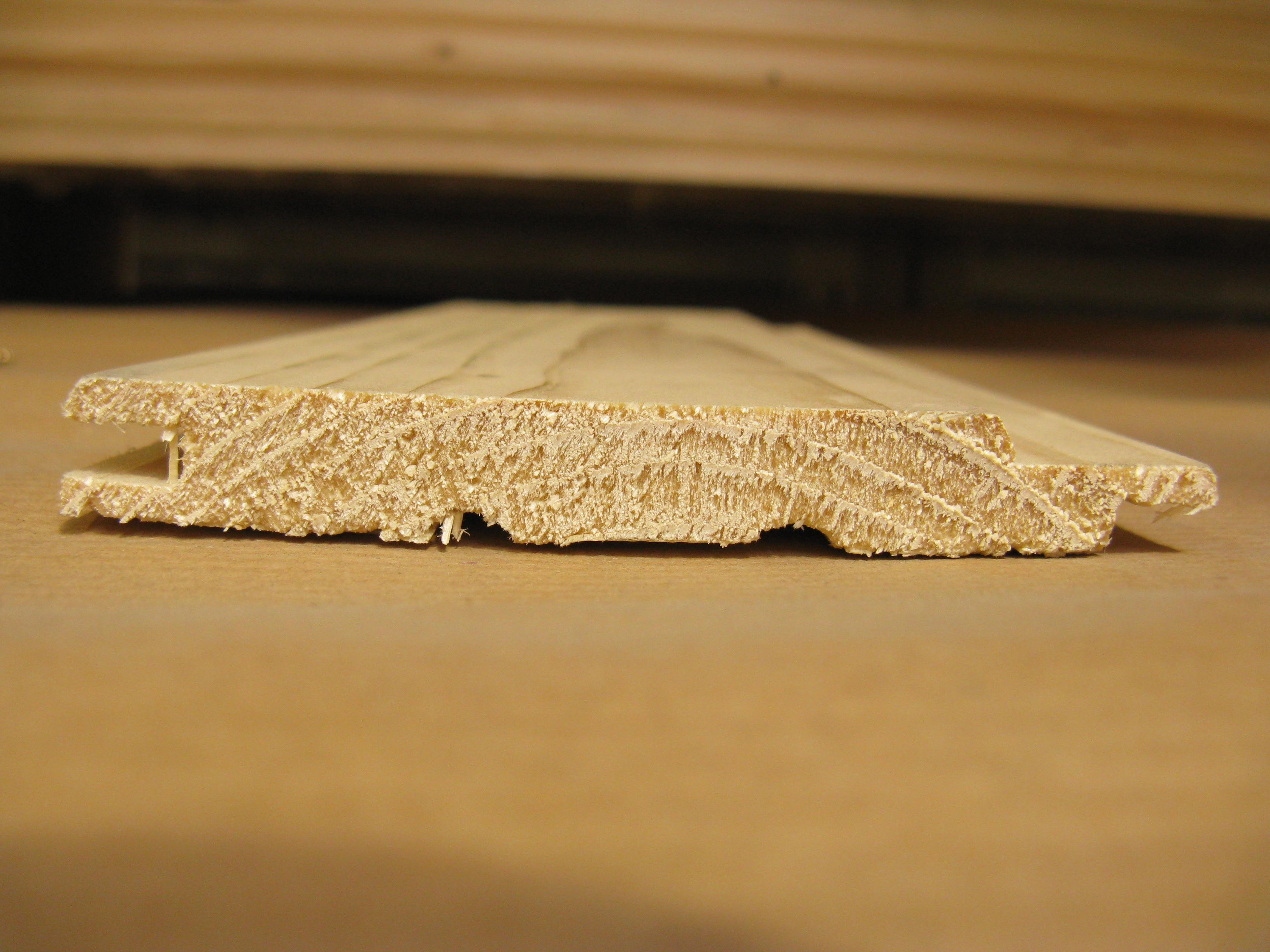 Profilholz